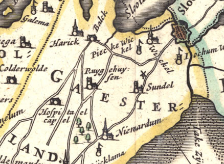 Detail kaart van Frisia in de Atlas Maior van Joan Blaeu met de kerk van Ruijgahuizen